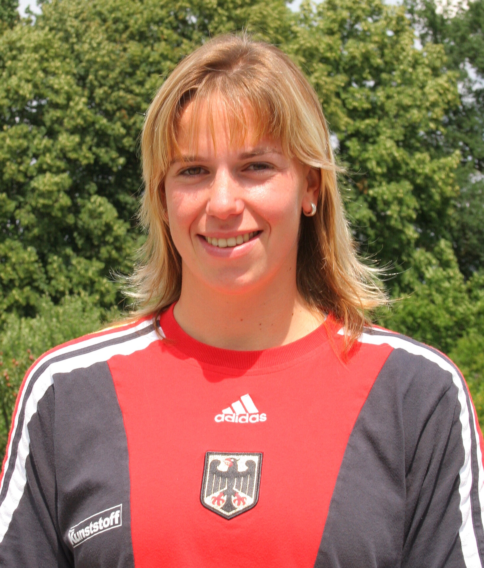 Vizeweltmeisterin im Einer-Kajak über 1.000m im Jahr 2007 (Kanu-Rennsport)